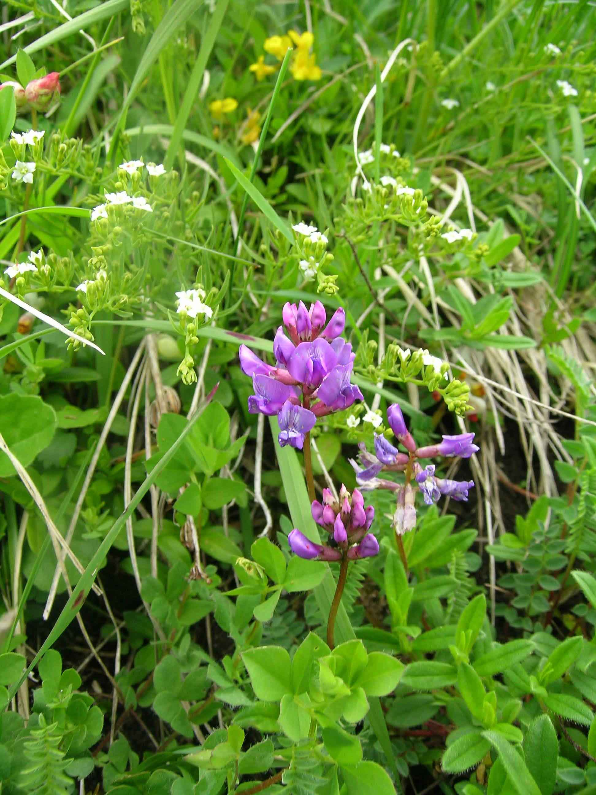 Astragalus australis, Schynige Platte (CH, Kt. Bern)